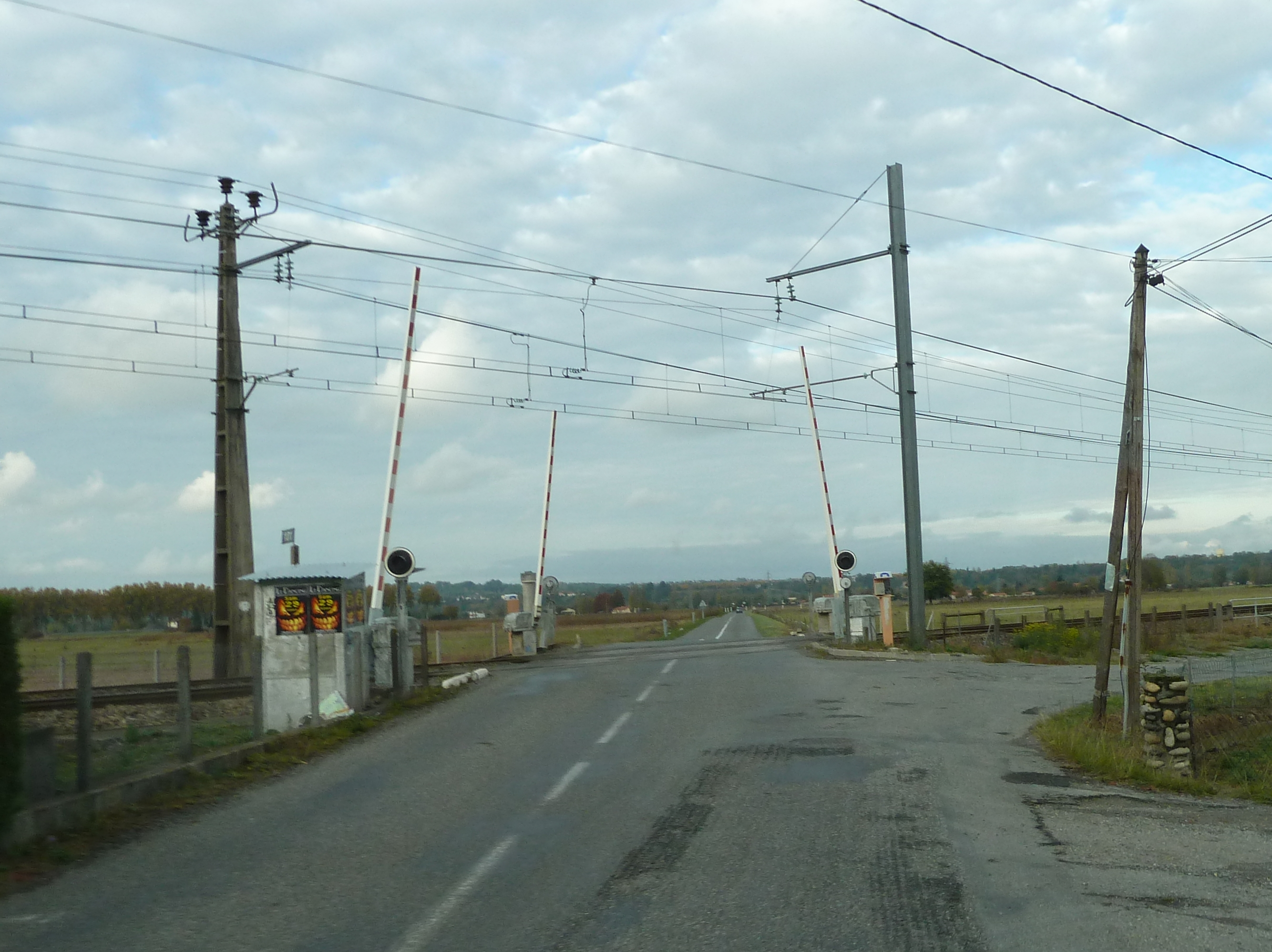 Vois ferrée à Labarthe-Rivière